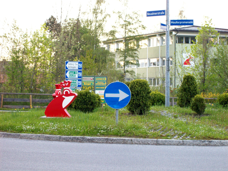 Kreisel in Hallein, mit dem Erdal-Frosch, im Hintergrund auch das Werksgebäude